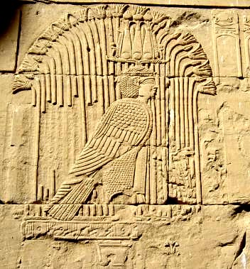 De Ka van Mandulis, tempel van Kalabsha, Egypte